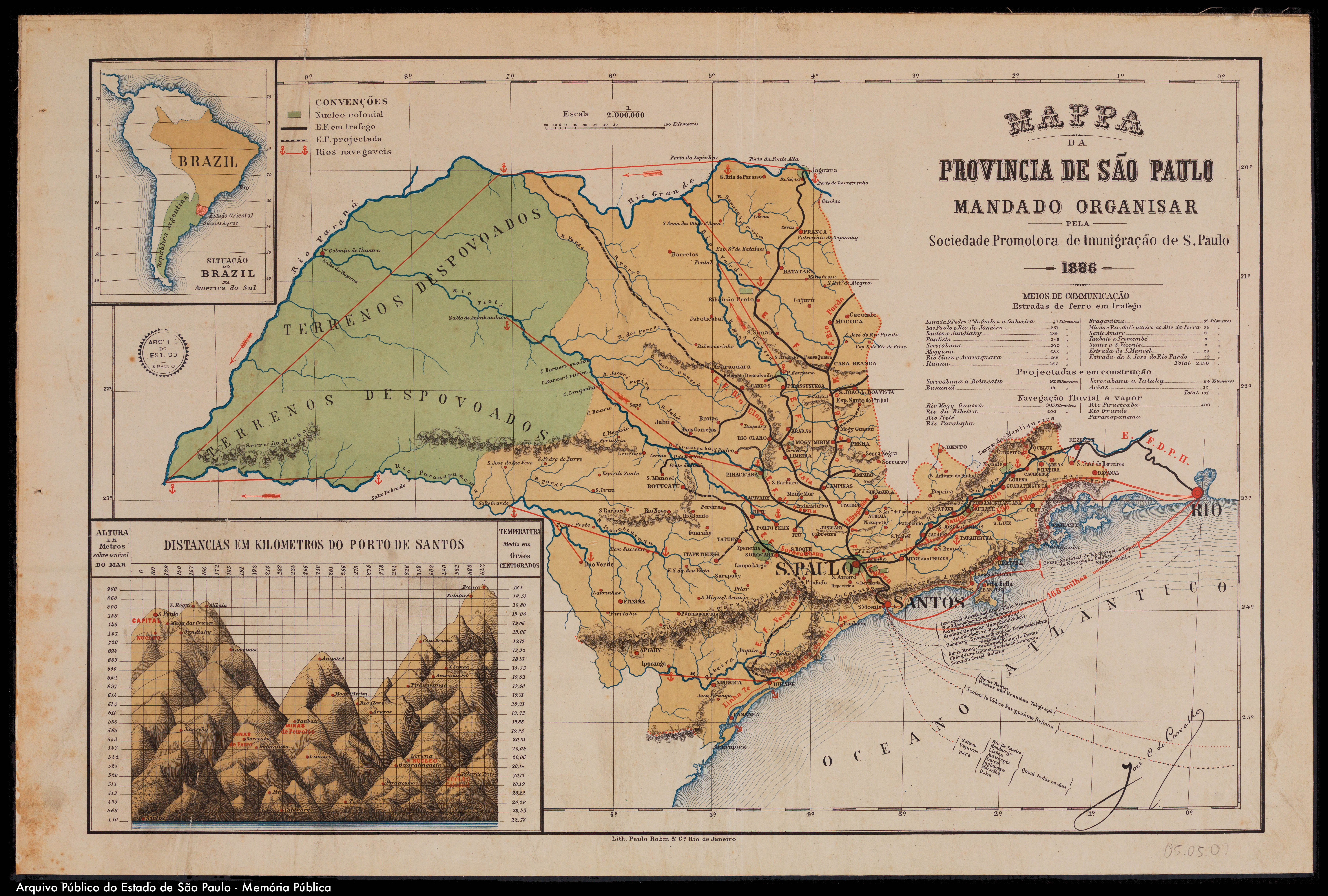 Mappa della Provincia di San Paolo organizzata dalla Società Promotrice d'Immigrazione di S. Paolo